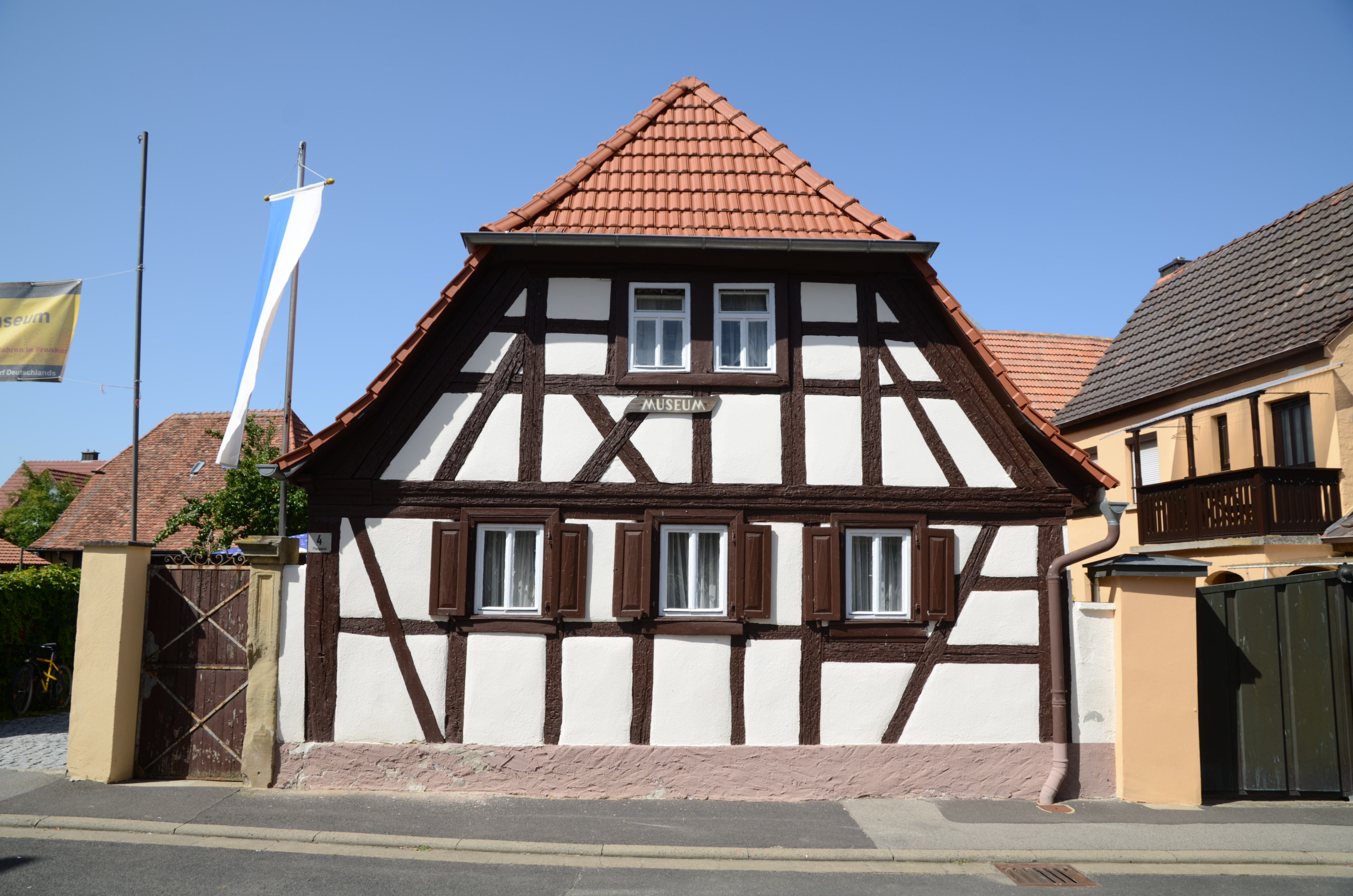 Schwanfeld Pfarrgasse 4